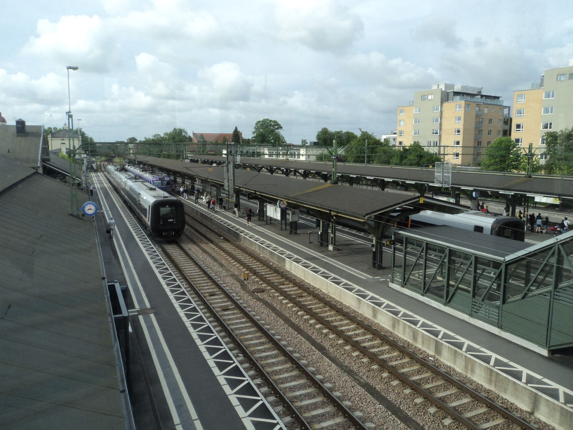 Stationsområdet på Lund C. Från vänster: Ö-tåg som ej är i trafik, pågatåg mot Malmö inväntar avgång samt ö-tåg mot Köpenhamn(-Helsingör) inväntar avgång